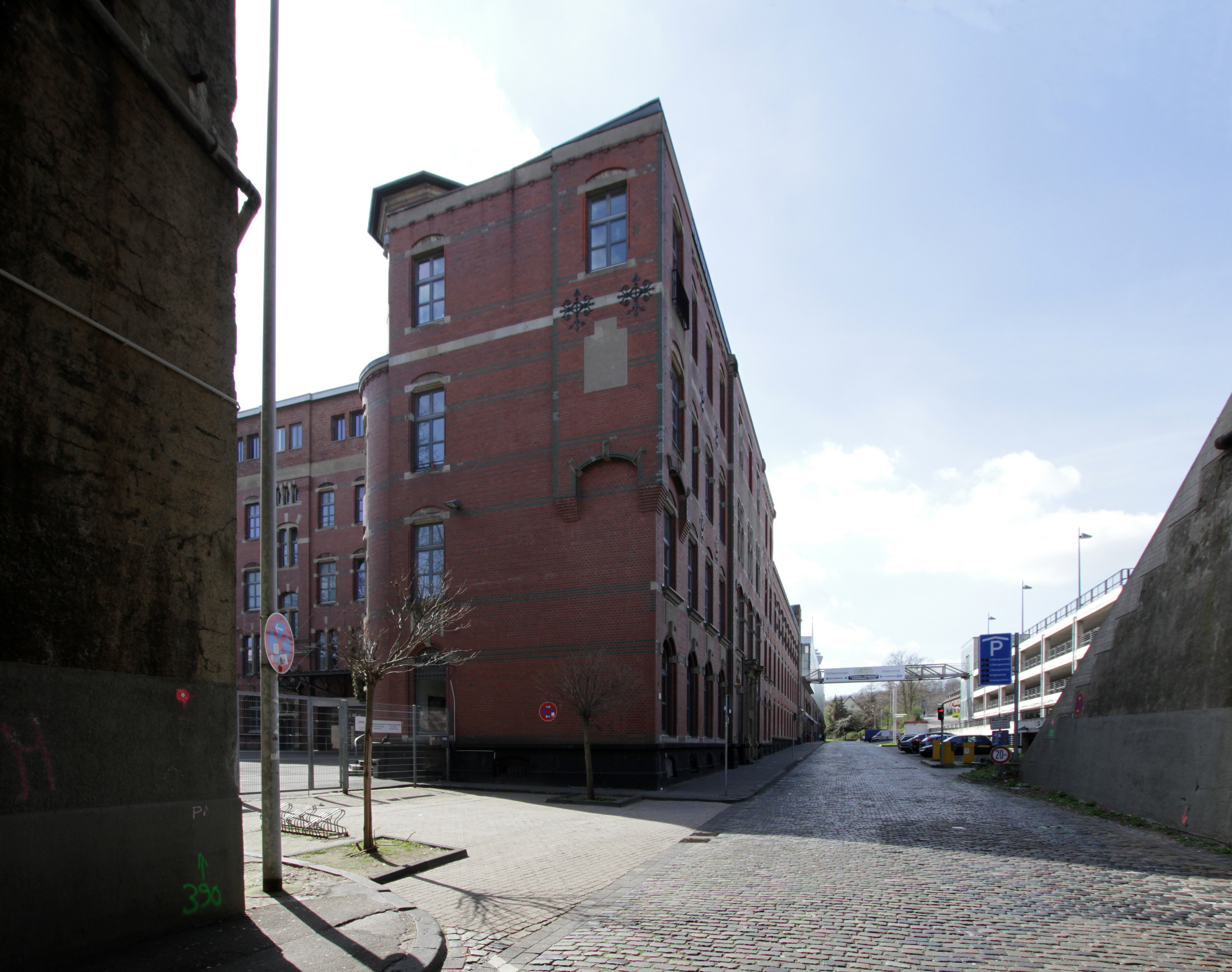 Köln-Neustadt-Nord, Gladbacher Wall 5. Ehemaliges Postamt für Frachtgut von 1895 This is a photograph of an architectural monument.